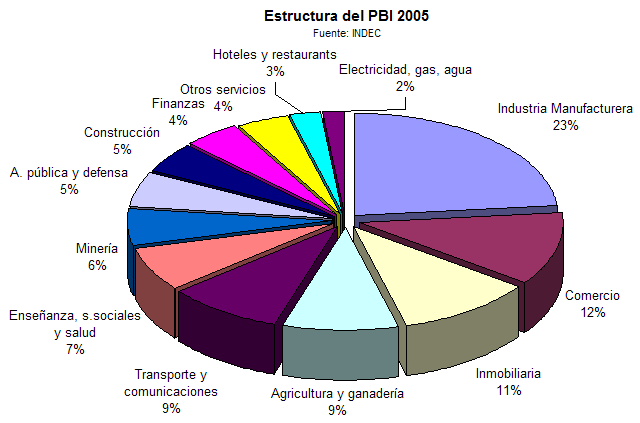 Argentina. Estructura del PBI(GDP structure)- 2005. Graphic